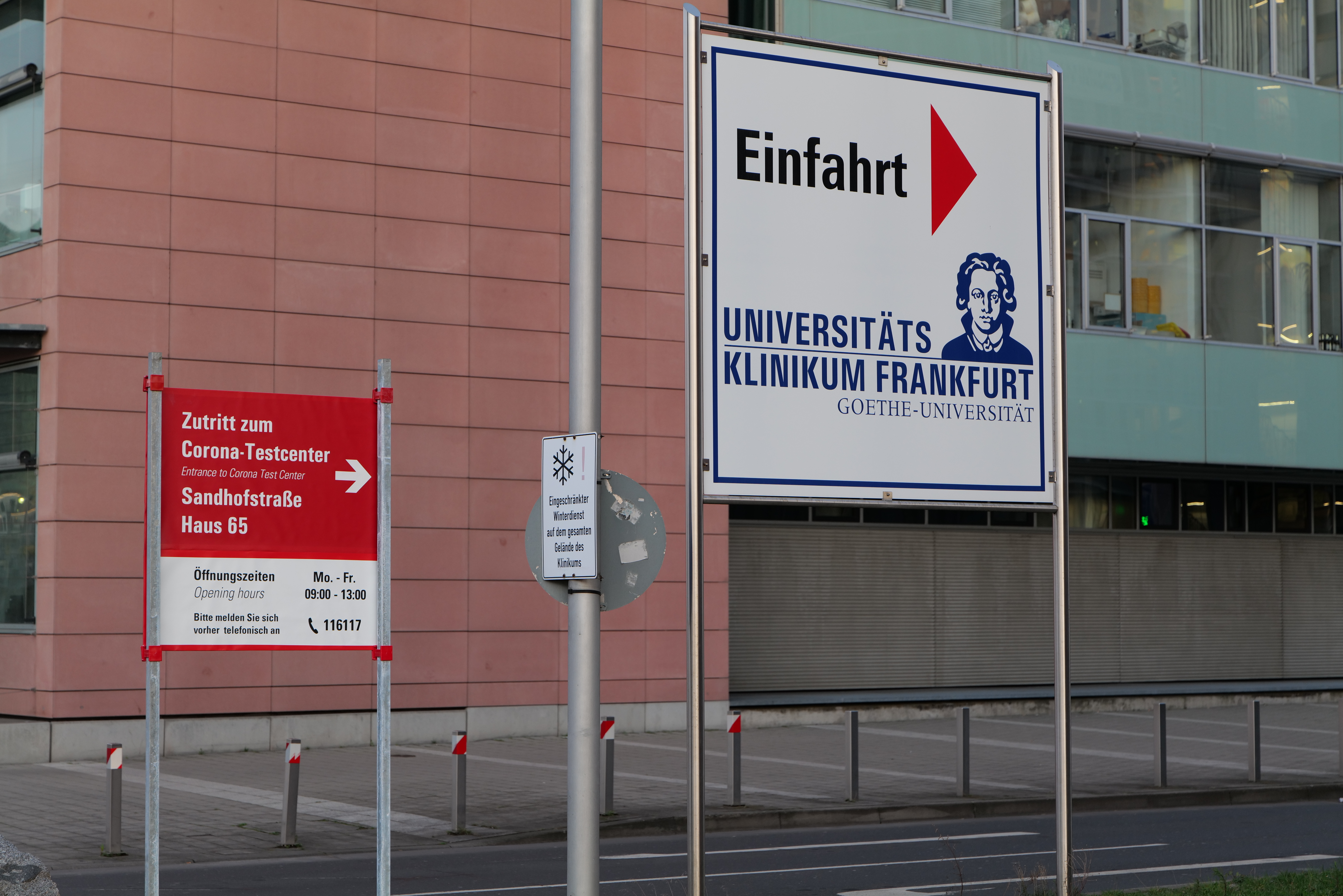 Hinweis zum Coronavirus Testzentrum Frankfurt am Main an der Universitätsklinik am 22. März 2020.